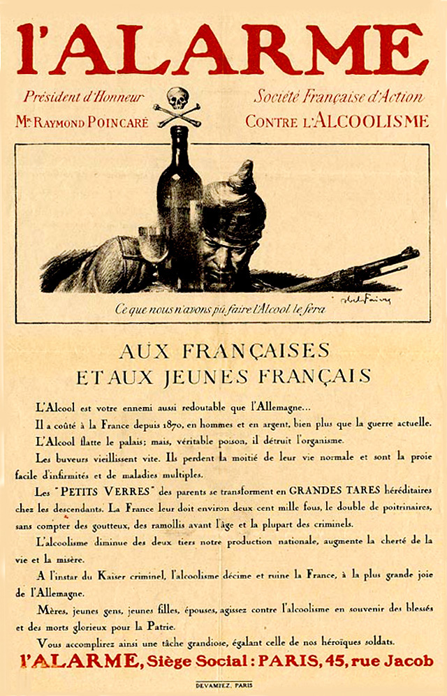 Affiche de lutte contre l'alcoolisme 1918